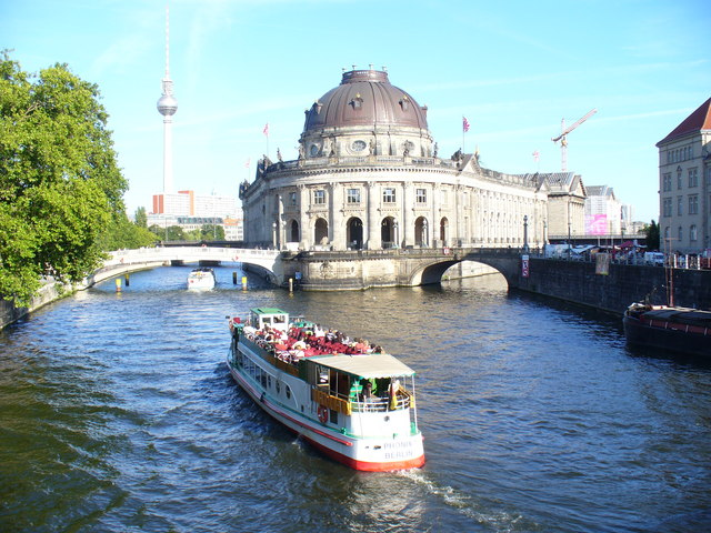 Bode-Museum